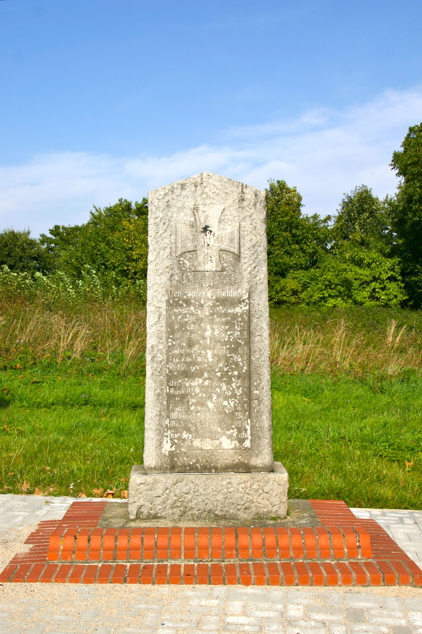 Laskowiec wieś w Polsce położona w województwie opolskim, w powiecie prudnickim, w gminie Biała.